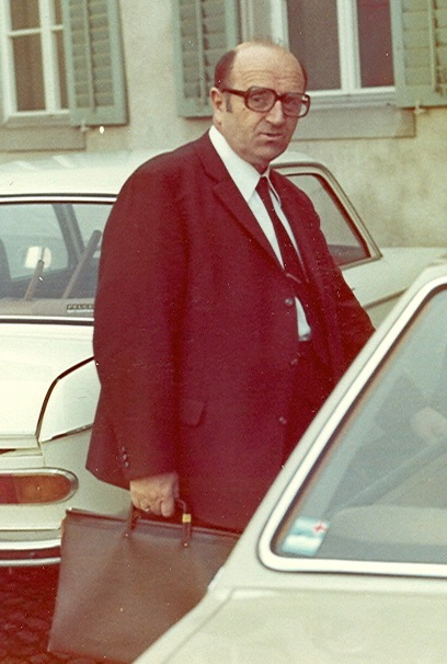 Walter Zulliger, Direktor an der Kantonsschule Küsnacht, 1973